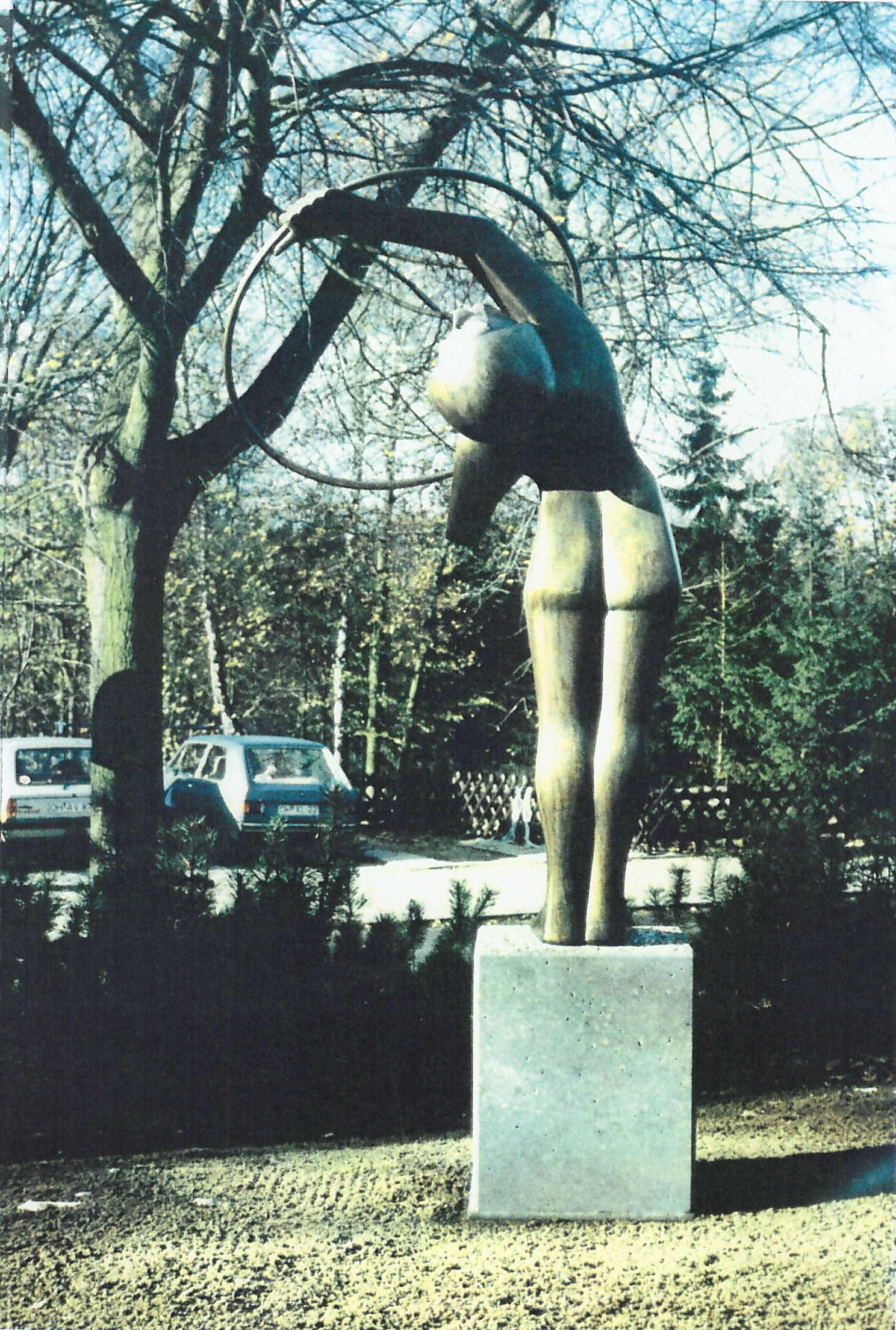 Statue einer Gymnastin mit Reifen in Pansdorf